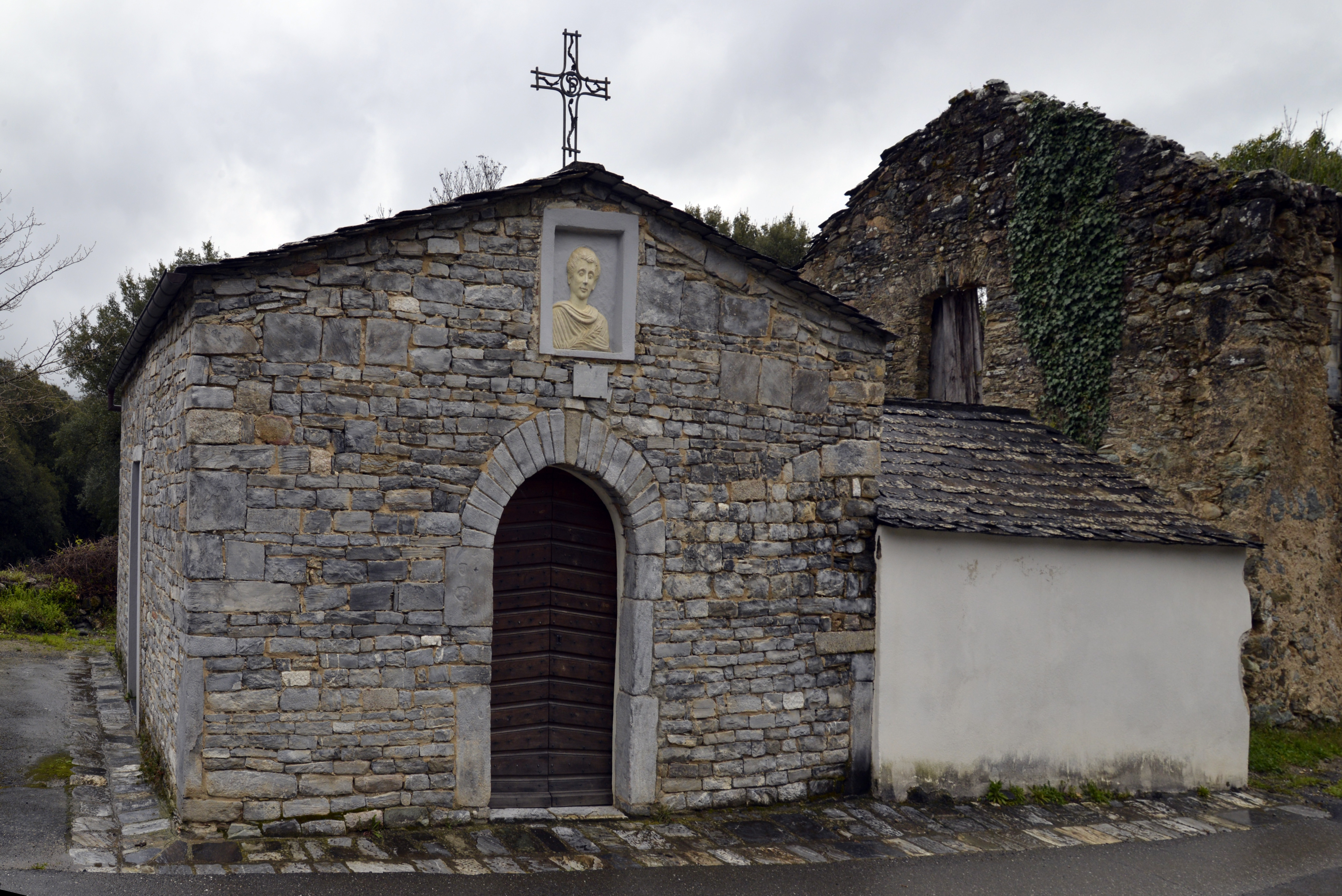 Corte, Haute-Corse - Façade principale, ou occidentale, de la chapelle romane Saint-Pancrace (San Pancrazio). L'entrée est surmontée d'un portrait de Saint Pancrace offert par T. Baldacci le 12 mai 1966